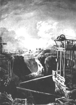 Dannemora mines